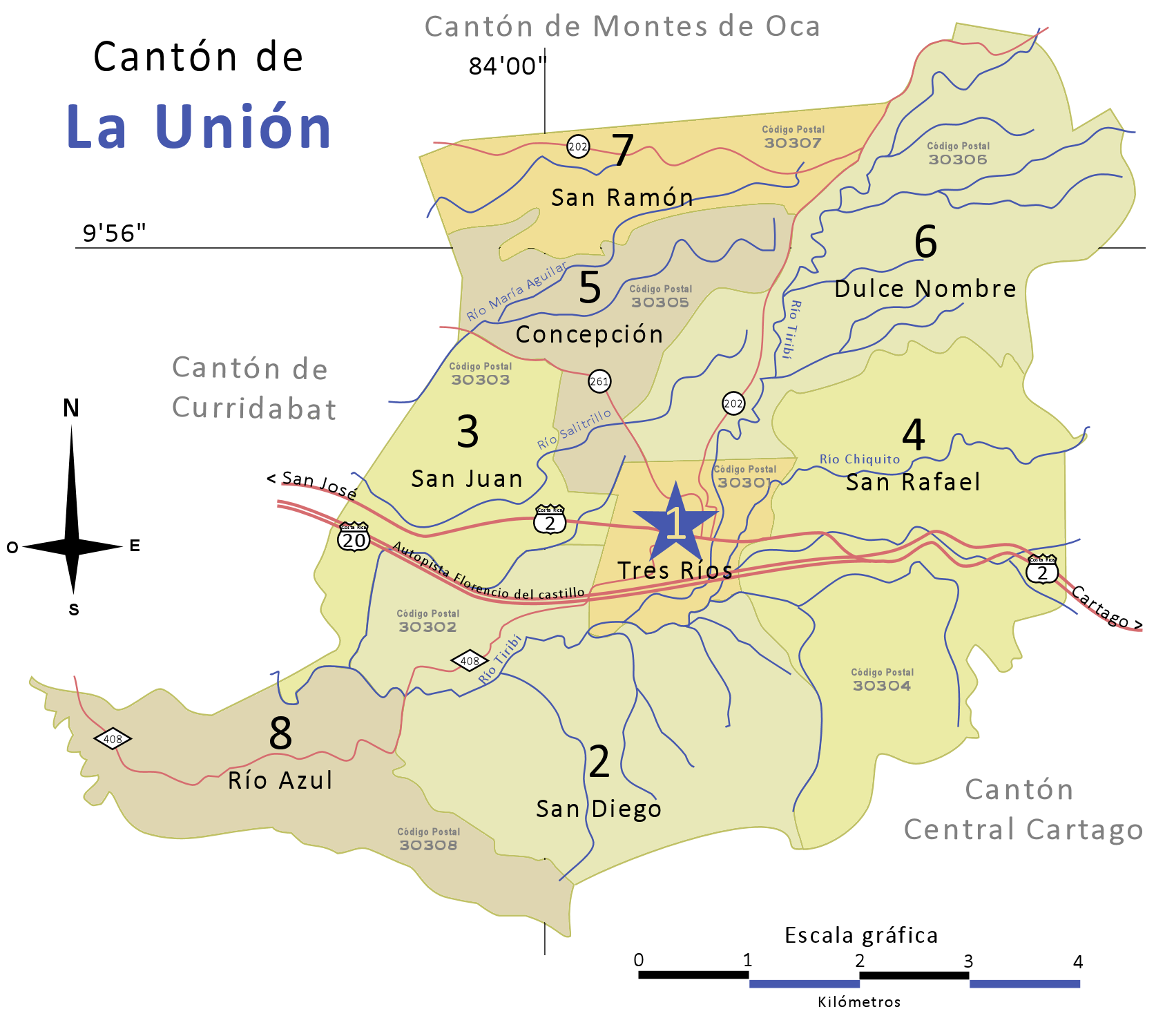 Mapa político, La Unión, Cartago, Costa Rica